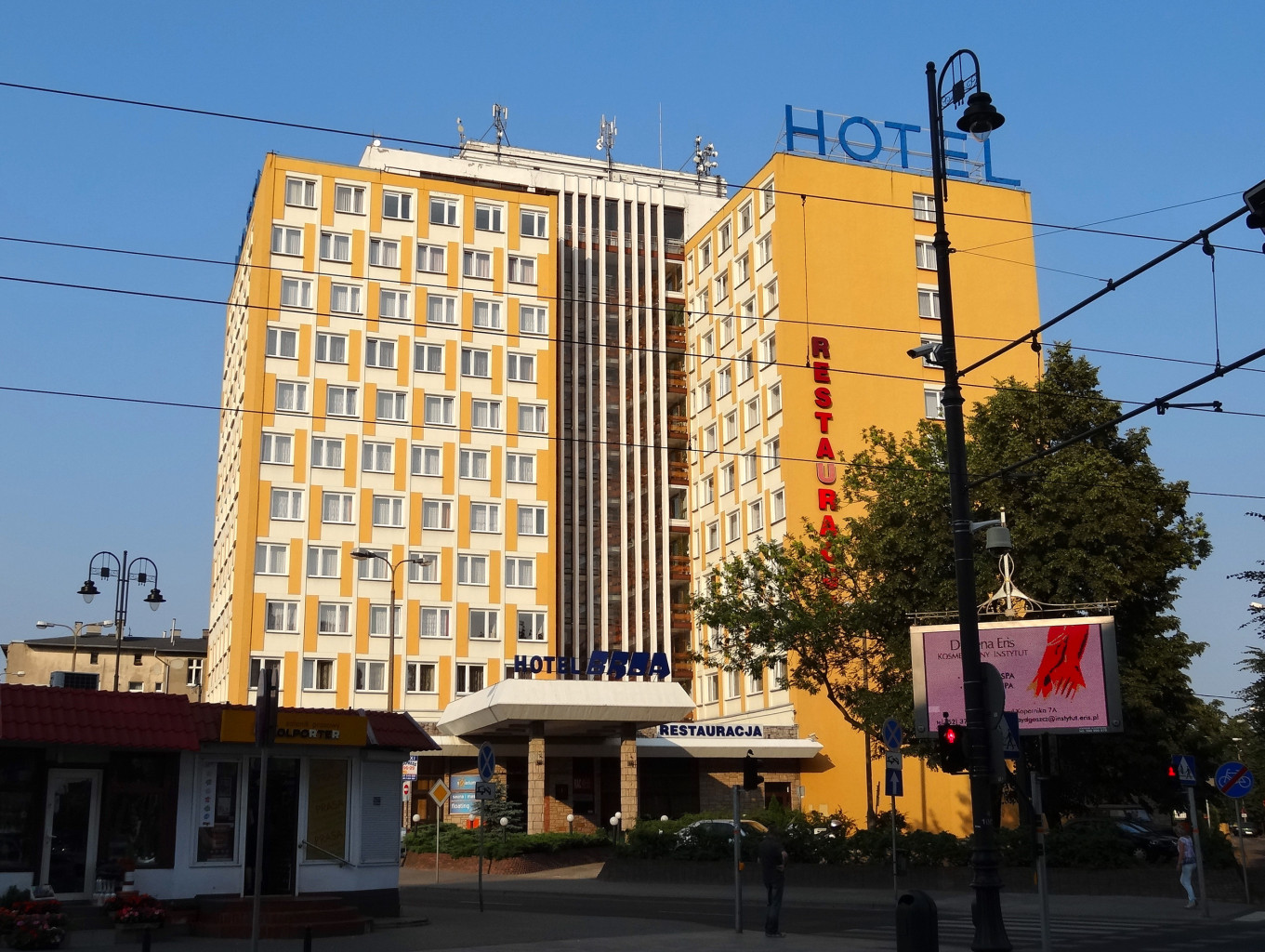 Hotel "Brda" ul. Dworcowa 94 w Bydgoszczy